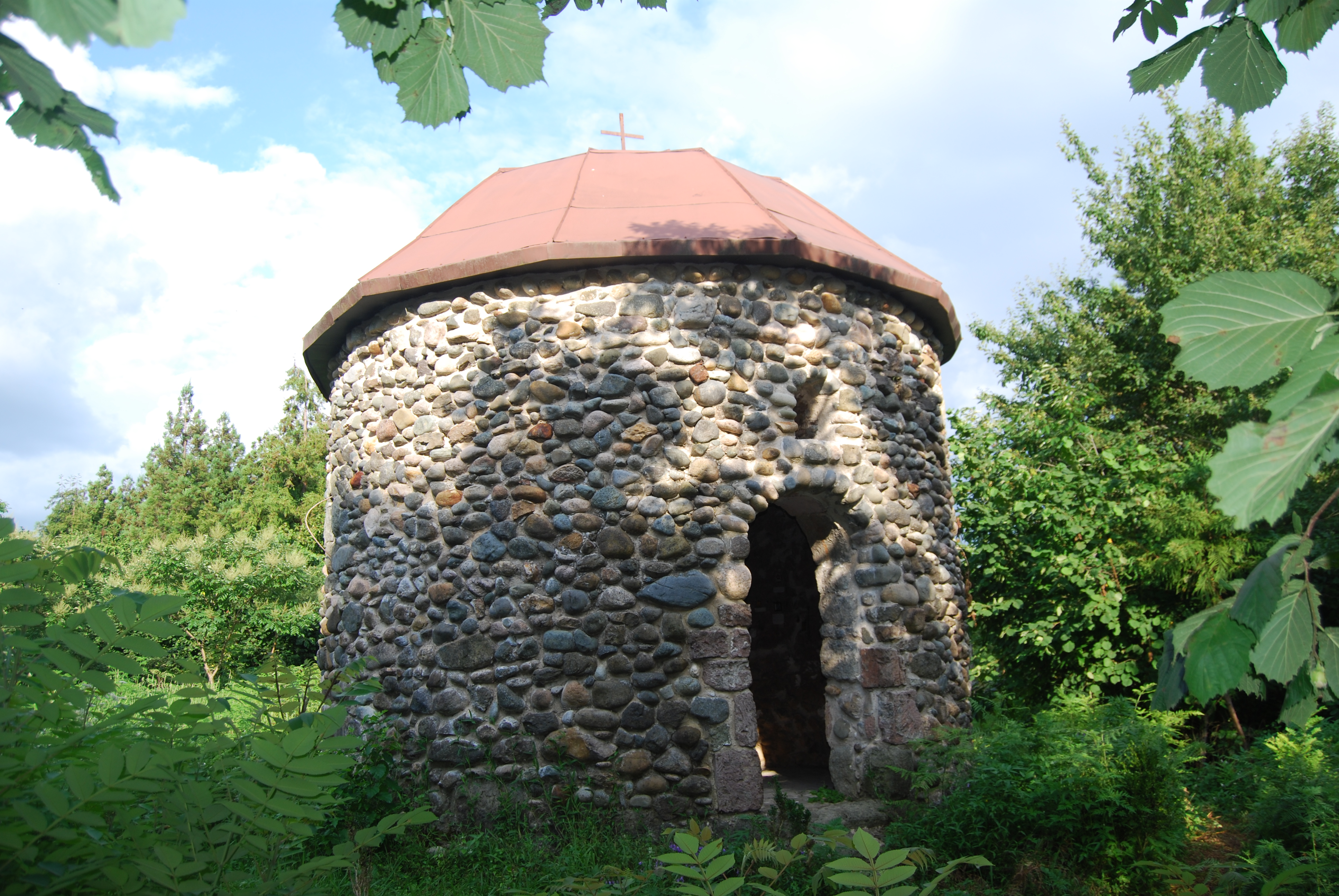 მრგვალი ეკლესია ლაითური-მერია-ოზურგეთის საზღვარზე (სპონიეთი, სპოტიეთი)